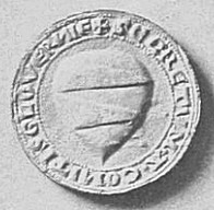 Amaury VI de Montfort-Évreux(1213)